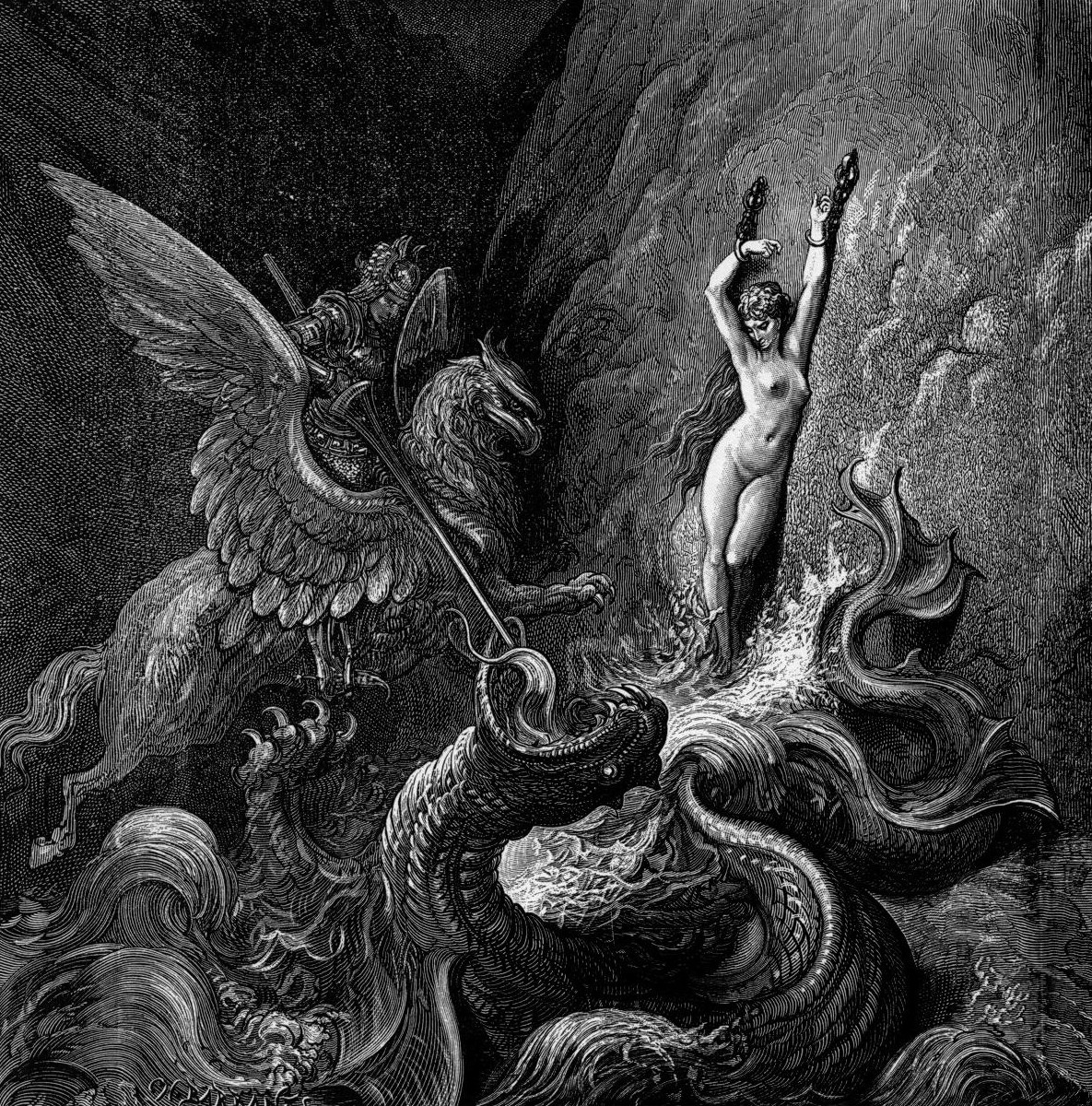 illustration of Ludovico Ariosto’s “Orlando Furioso”.